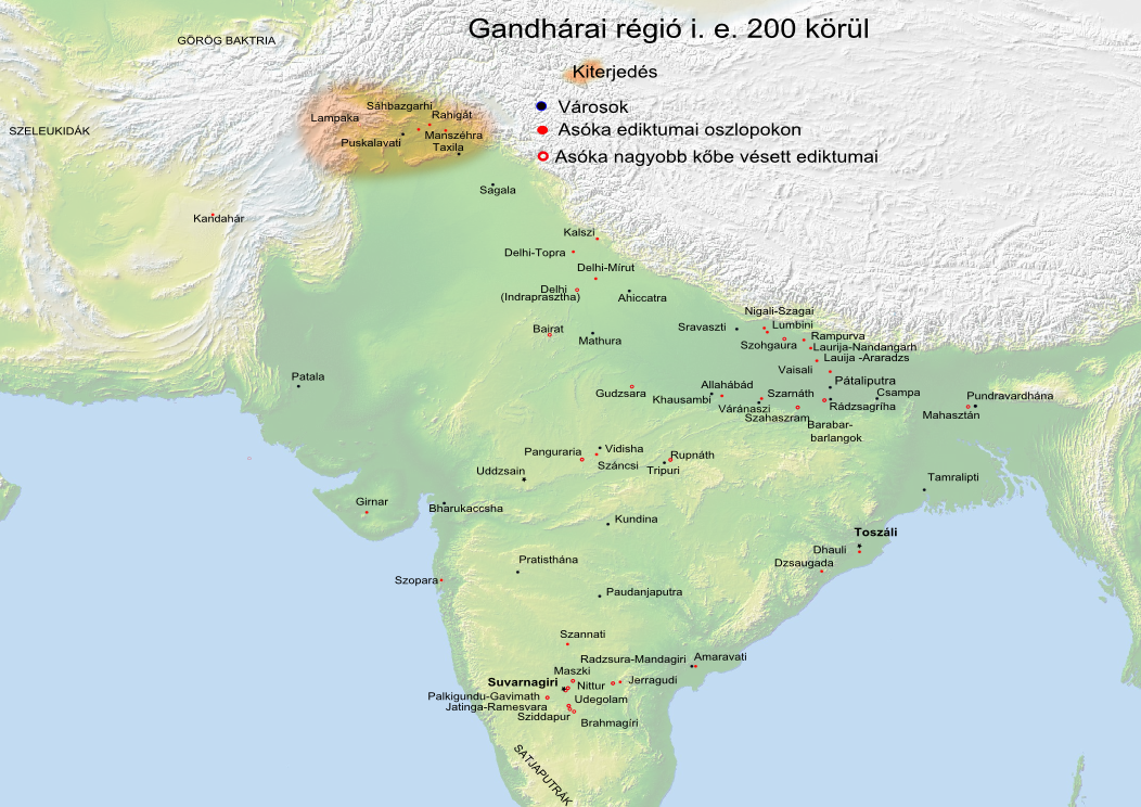 Gandhára i. e. 200 körül